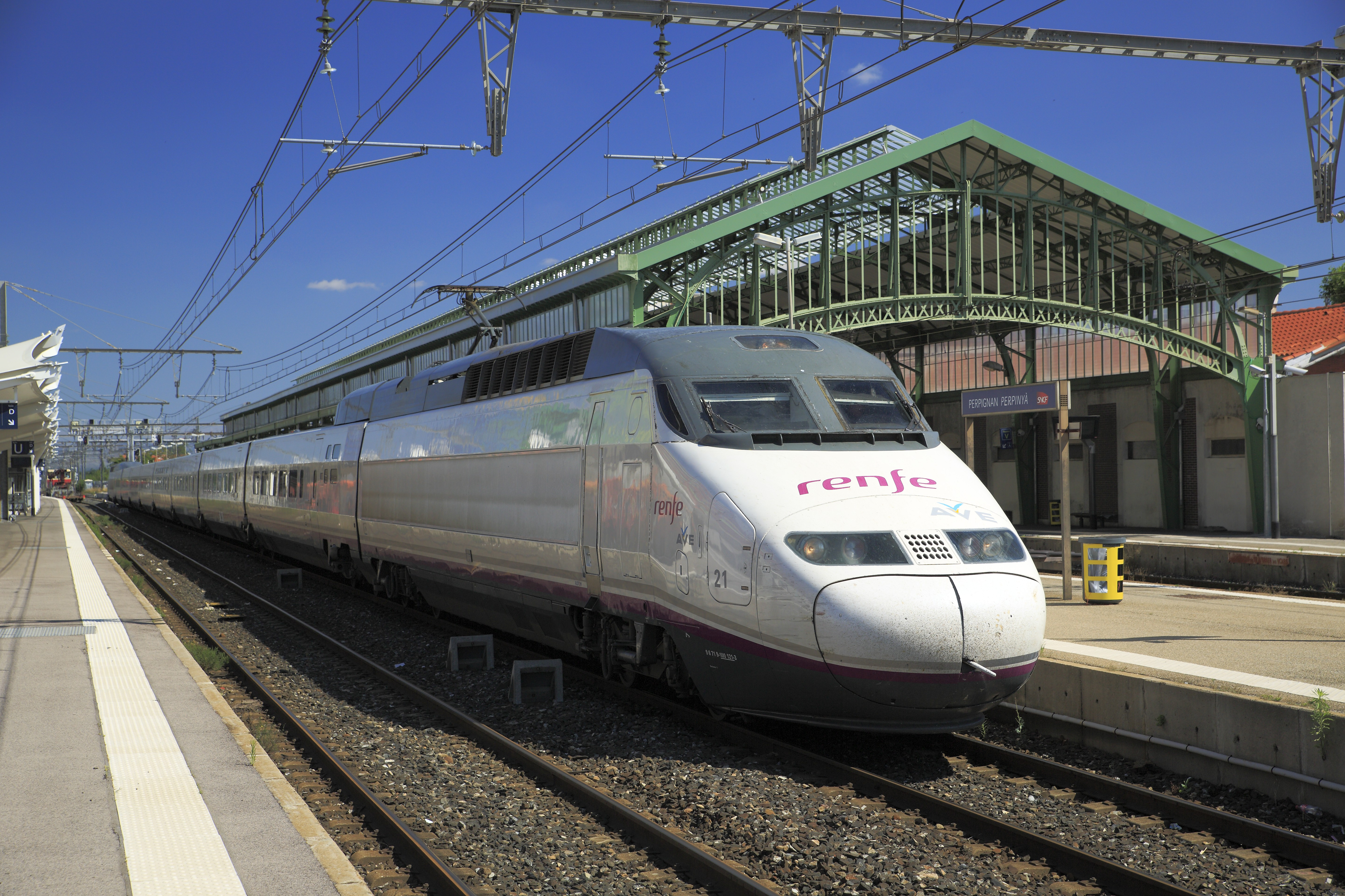 inzwischen und nach Anpassung an die französischen Verhältnisse laufen die Renfe-Hochgeschwindigkeitstriebzüge bis weit nach Frankreich durch. Der Zug kommt von Toulouse oder Paris und fährt nach Barcelona.